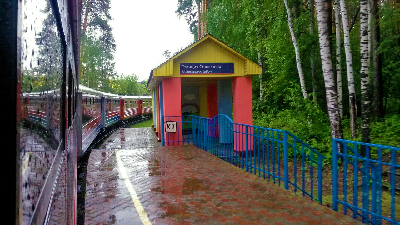 Остановочный пункт Солнечная, Свердловская ДЖД